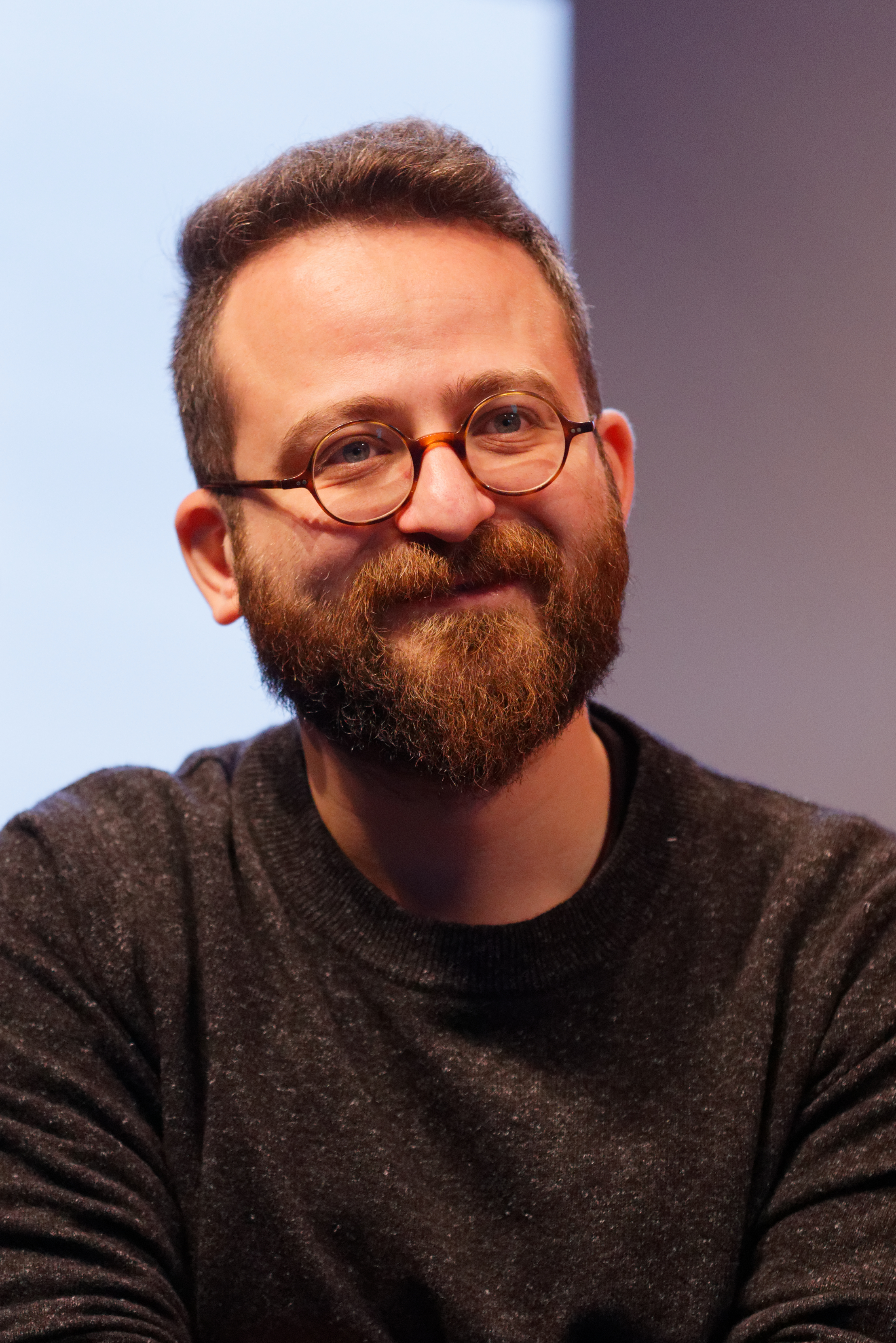 Mahmoud Sabbagh beim Talk der GWFF-Jury in der Audi Lounge zur Berlinale 2017